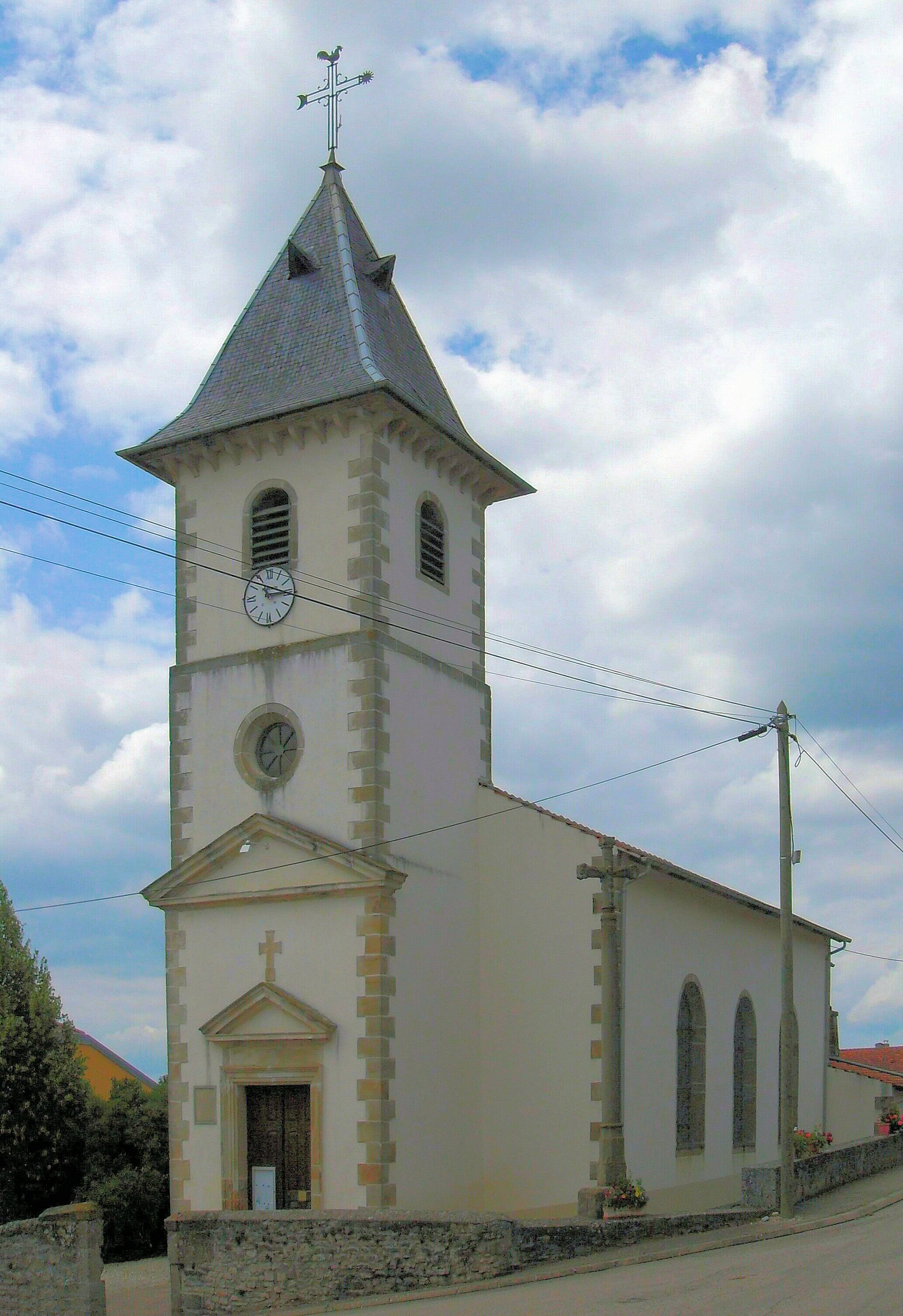 L'église Saint-Quirin d'Ahéville